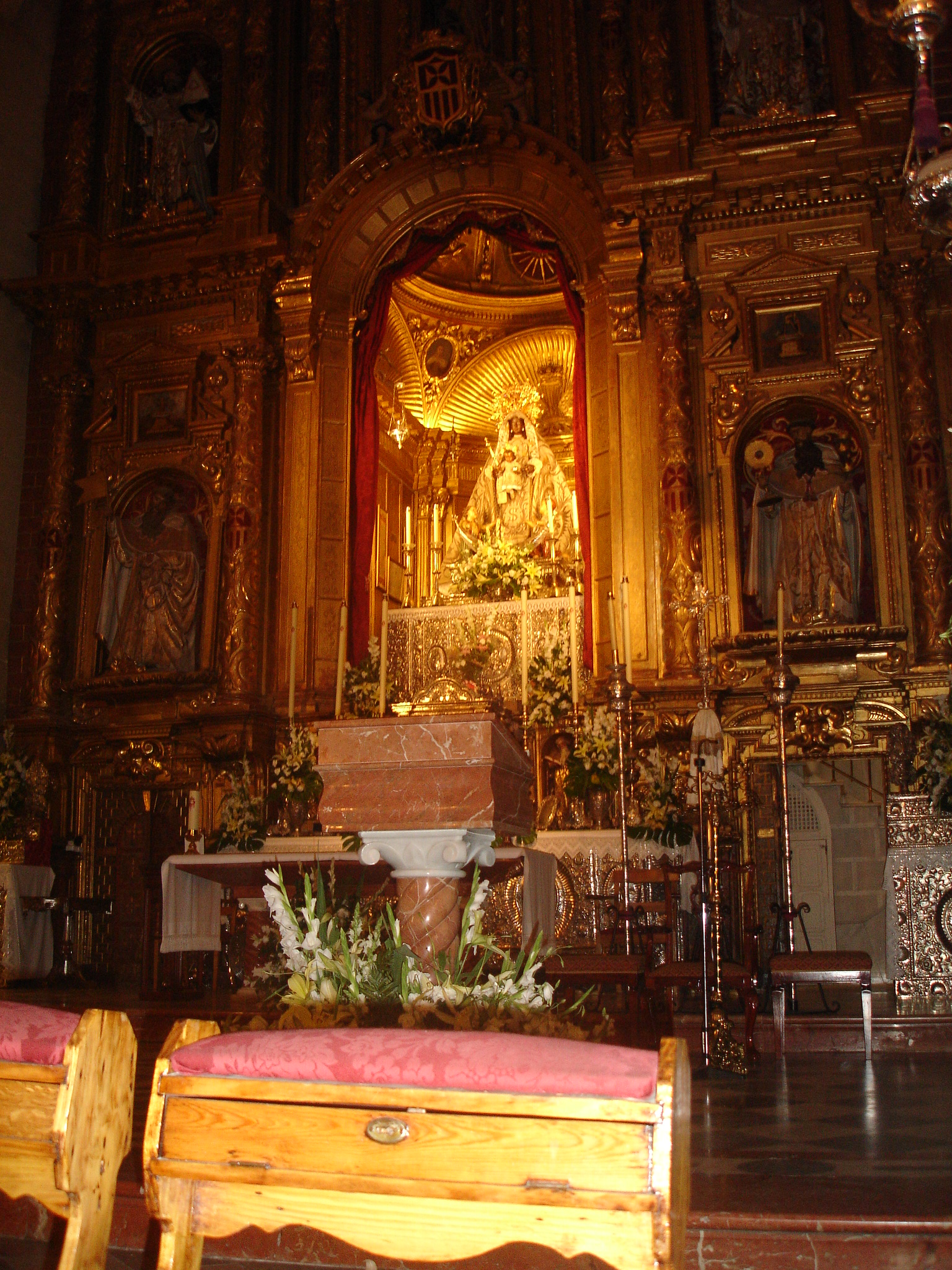 La Merced church, Jerez de la Frontera, Andalusia (Spain)